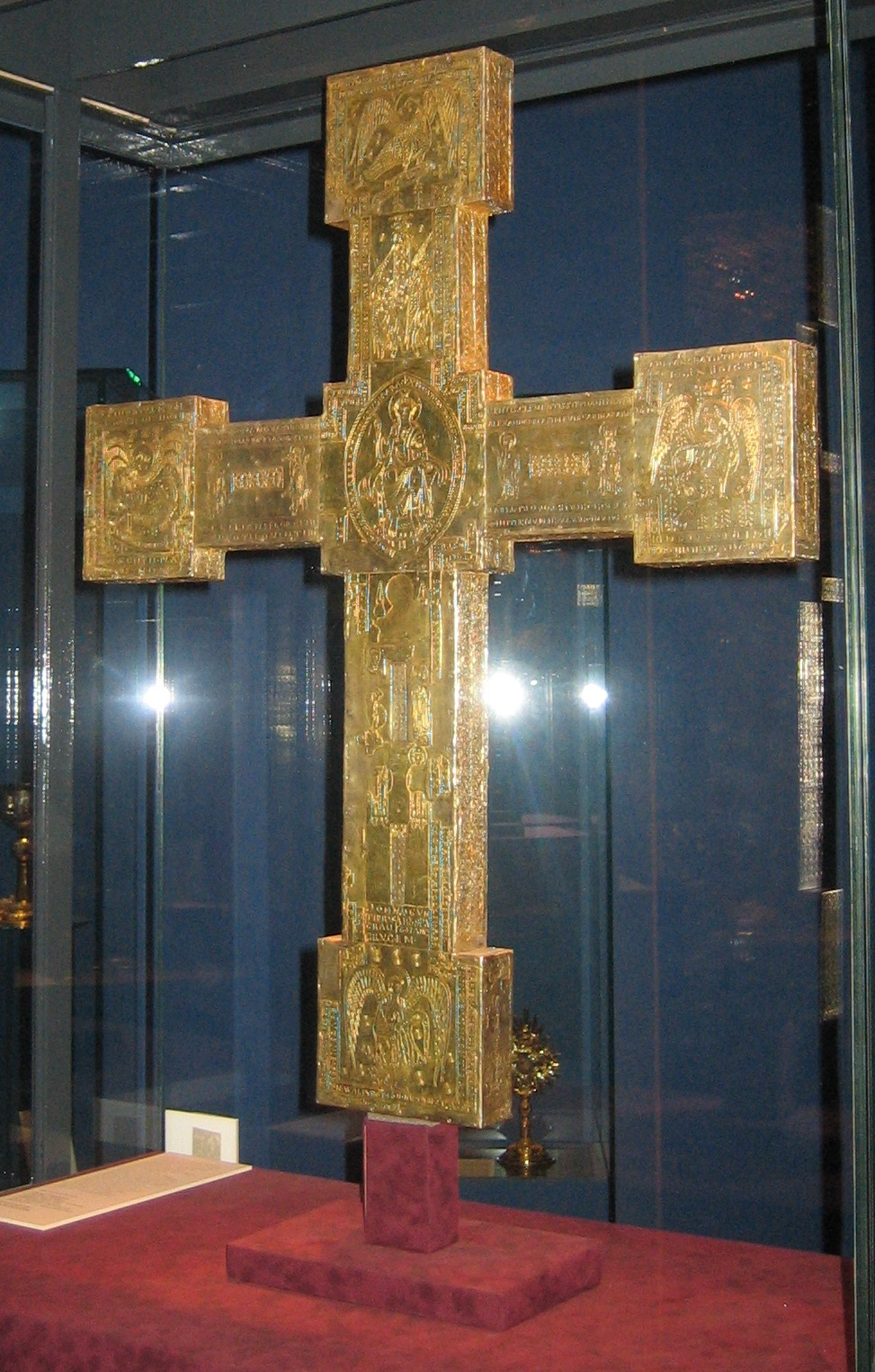 Adelheid-Kreuz (Rückseite), 11.-12. Jahrhundert, Stiftsmuseum St. Paul im Lavanttal